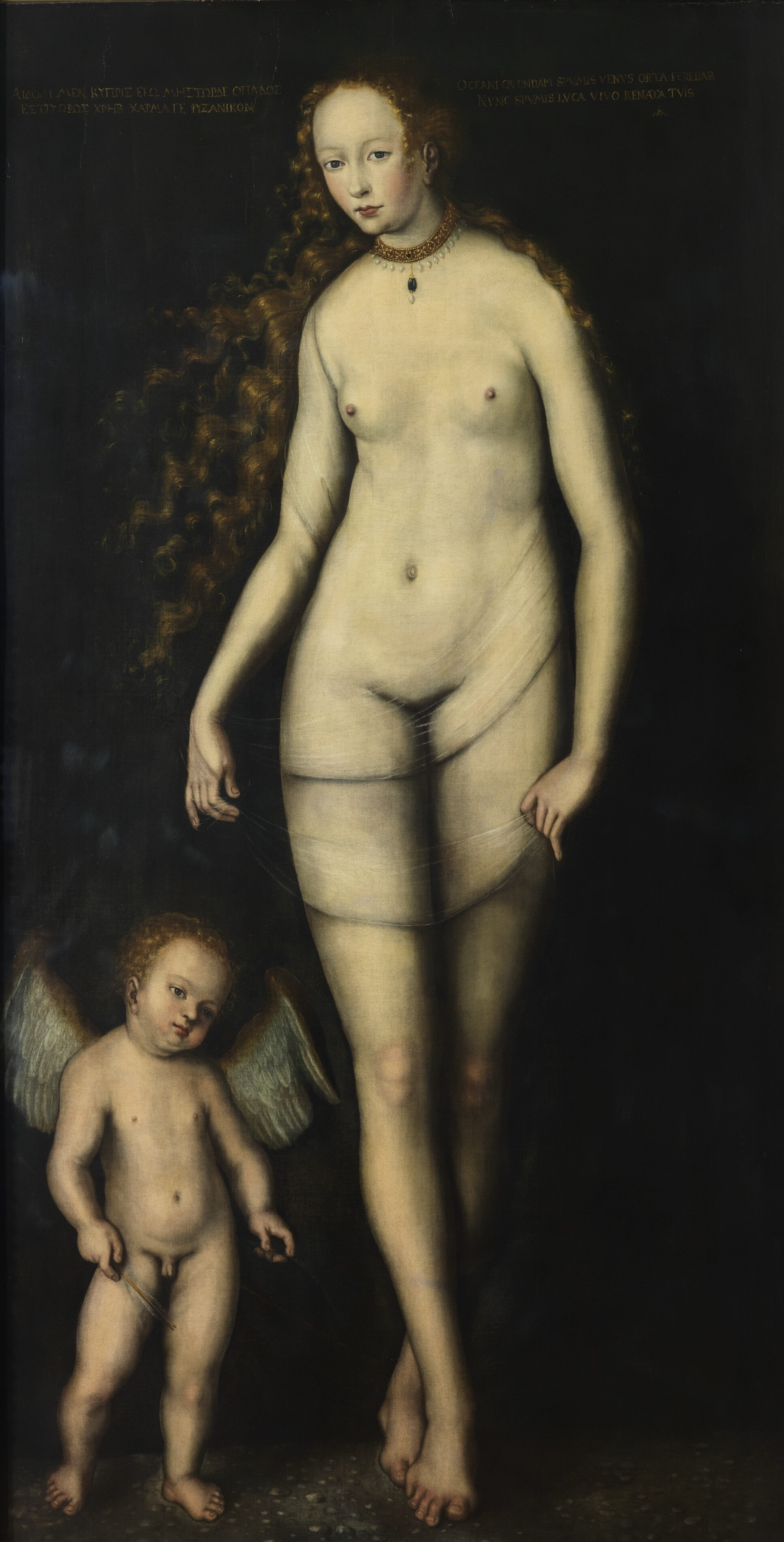 oder Kopie nach Lucas Cranach d.Ä., ca. 1600 oder später